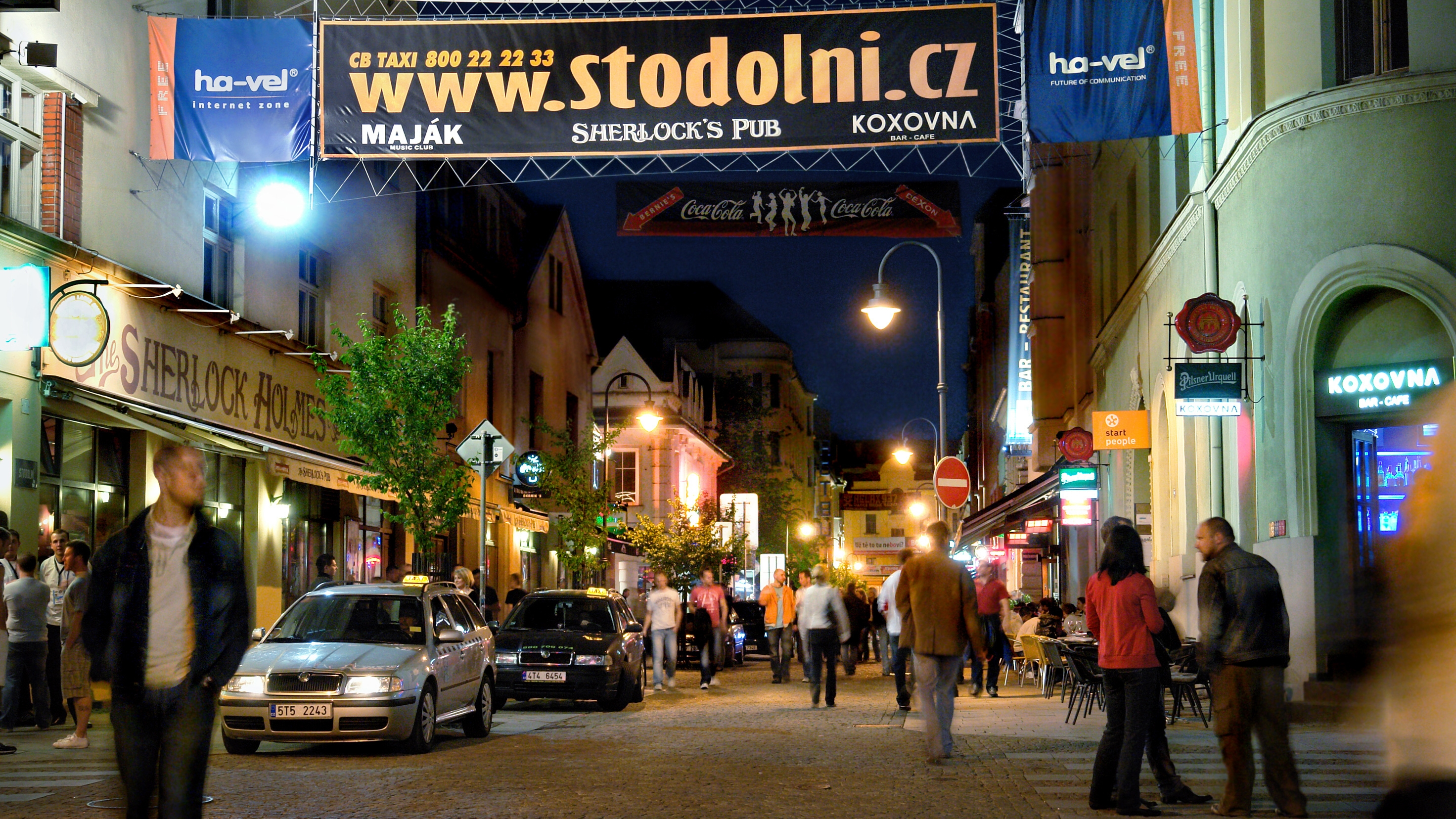 Nejživější ulice - Stodolní